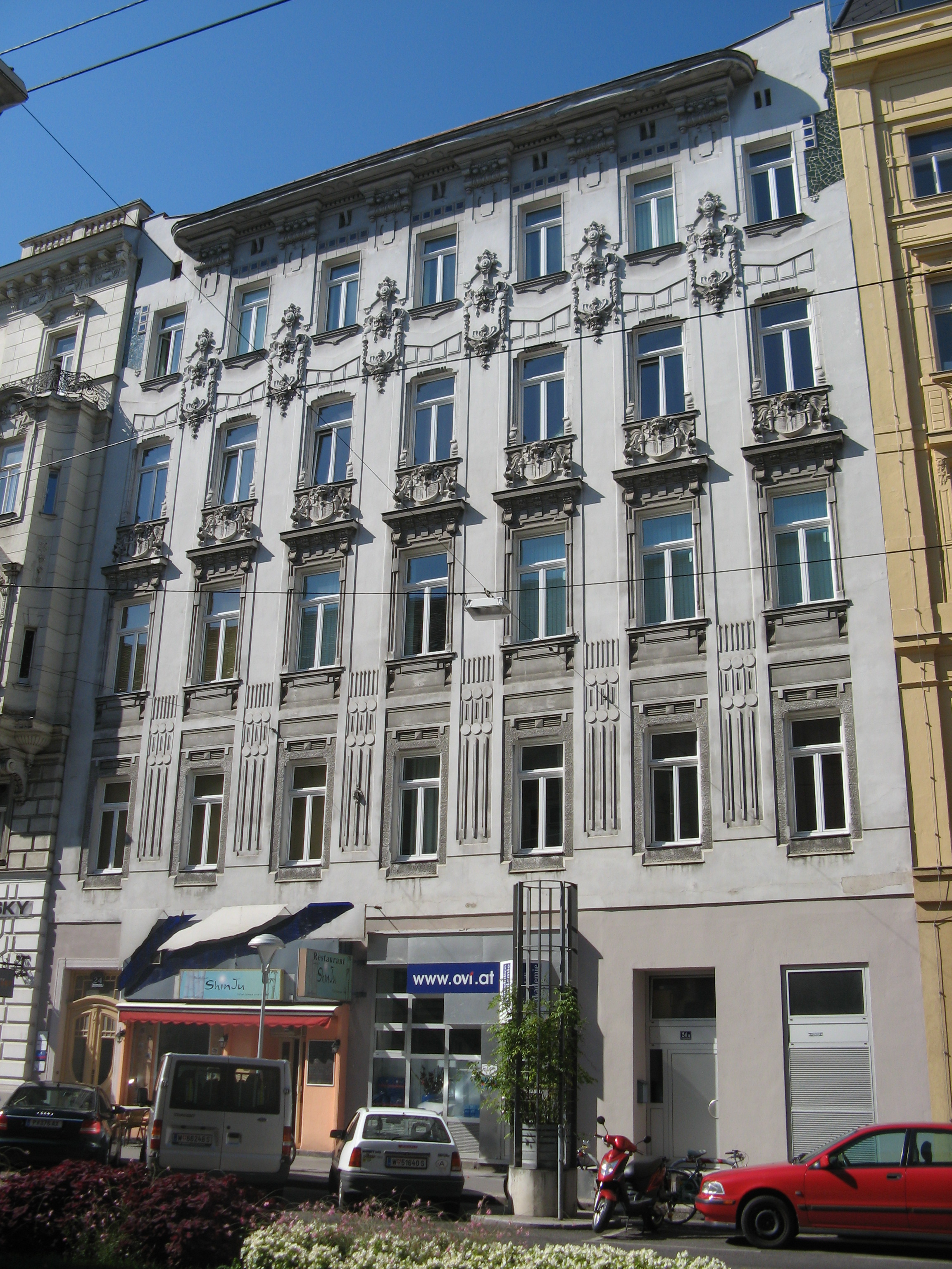 Haus (1902) von Franz Xaver Neumann, Favoritenstraße 24, Wien-Wieden